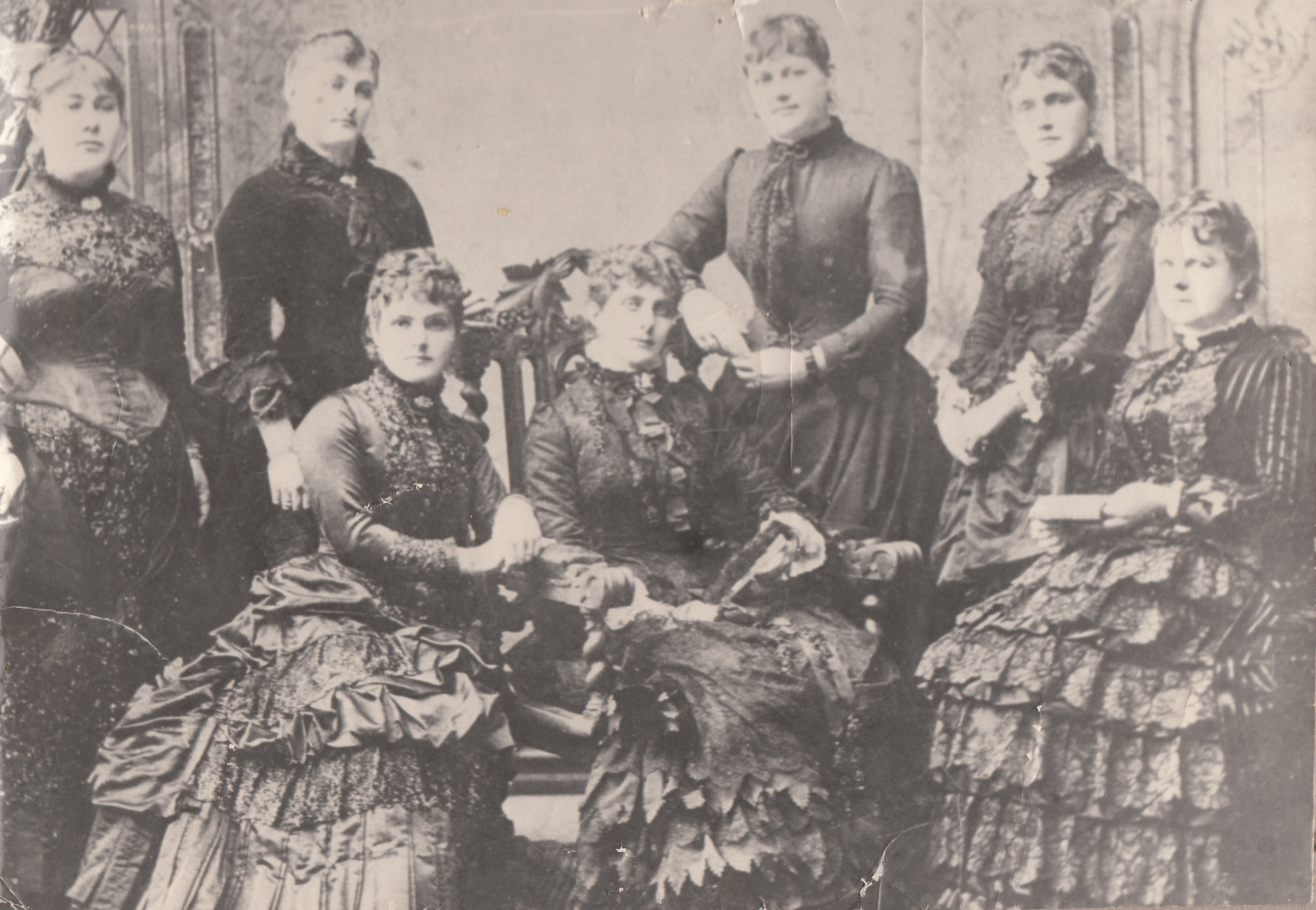 Fotografía del año de 1890 de la nietas del General Juan Mackenna O' Reilly. Son hijas de Juan Mackenna Vicuña y de Dominga Serrano Castro. De izquierda a derecha y: De pie: Filomena (de Valdés), Dolores (de Vicuña), Josefina (de Quesney) y Elena (de Errázuriz) Sentadas: Rosa (de Montes), María del Carmen (de Opazo y posteriormente de Eastman) y Clorinda (de Calvo)